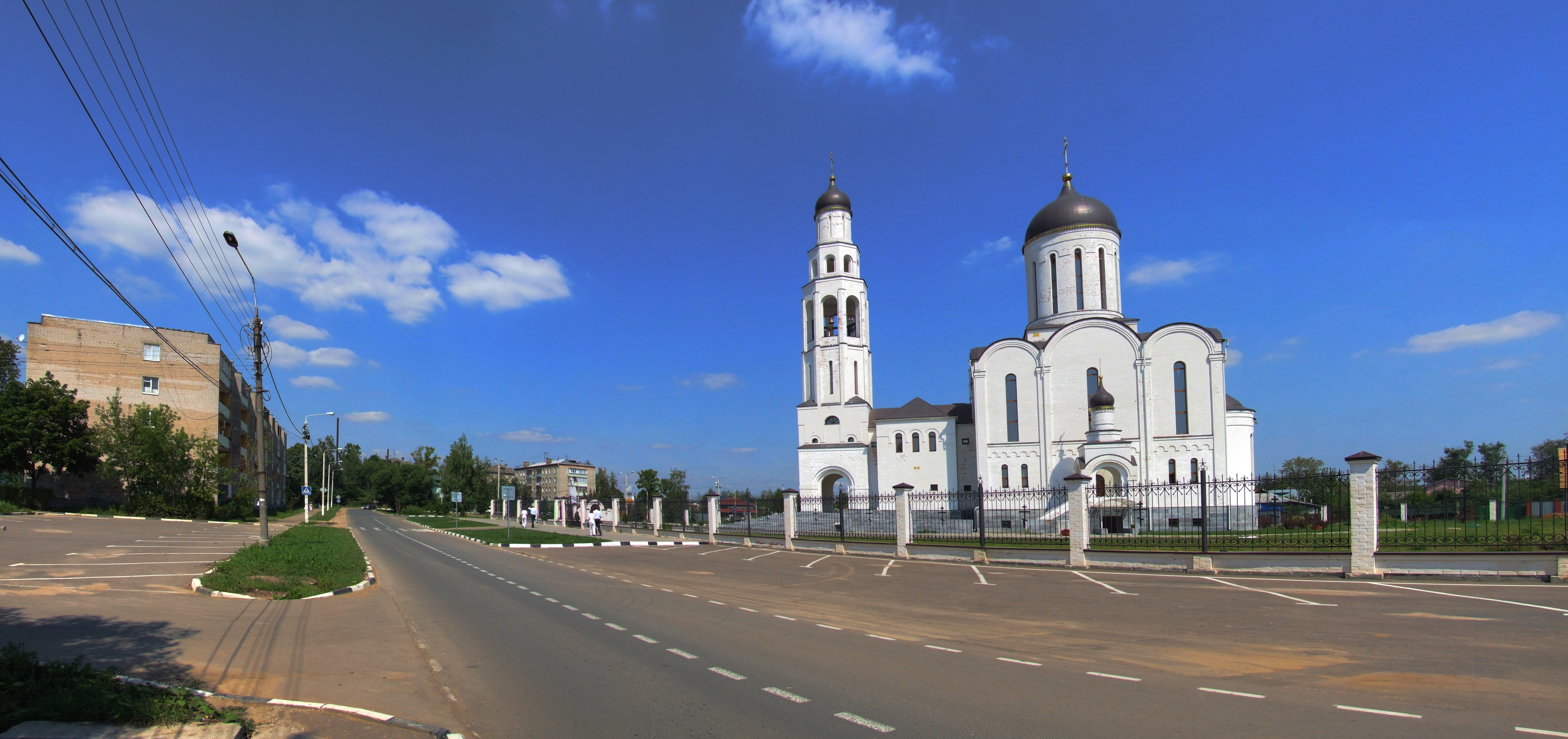 Церковь Илии Пророка в Апрелевке